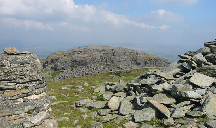 Foel Penolau from the summit of Moel Ysgyfarnogod